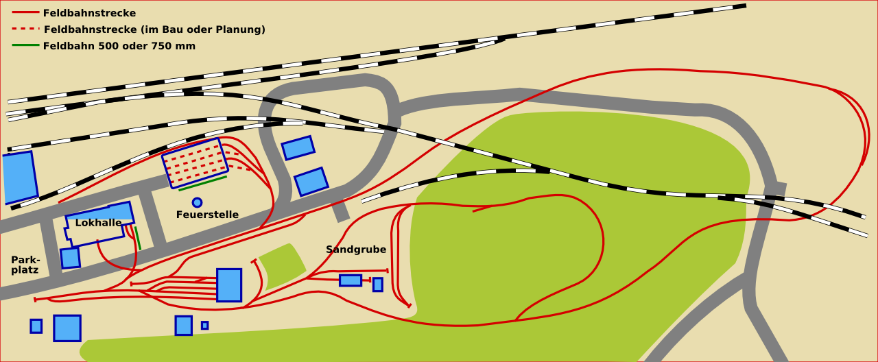 Plan der Feldbahnstrecken im Sächsischen Eisenbahnmuseum Chemnitz